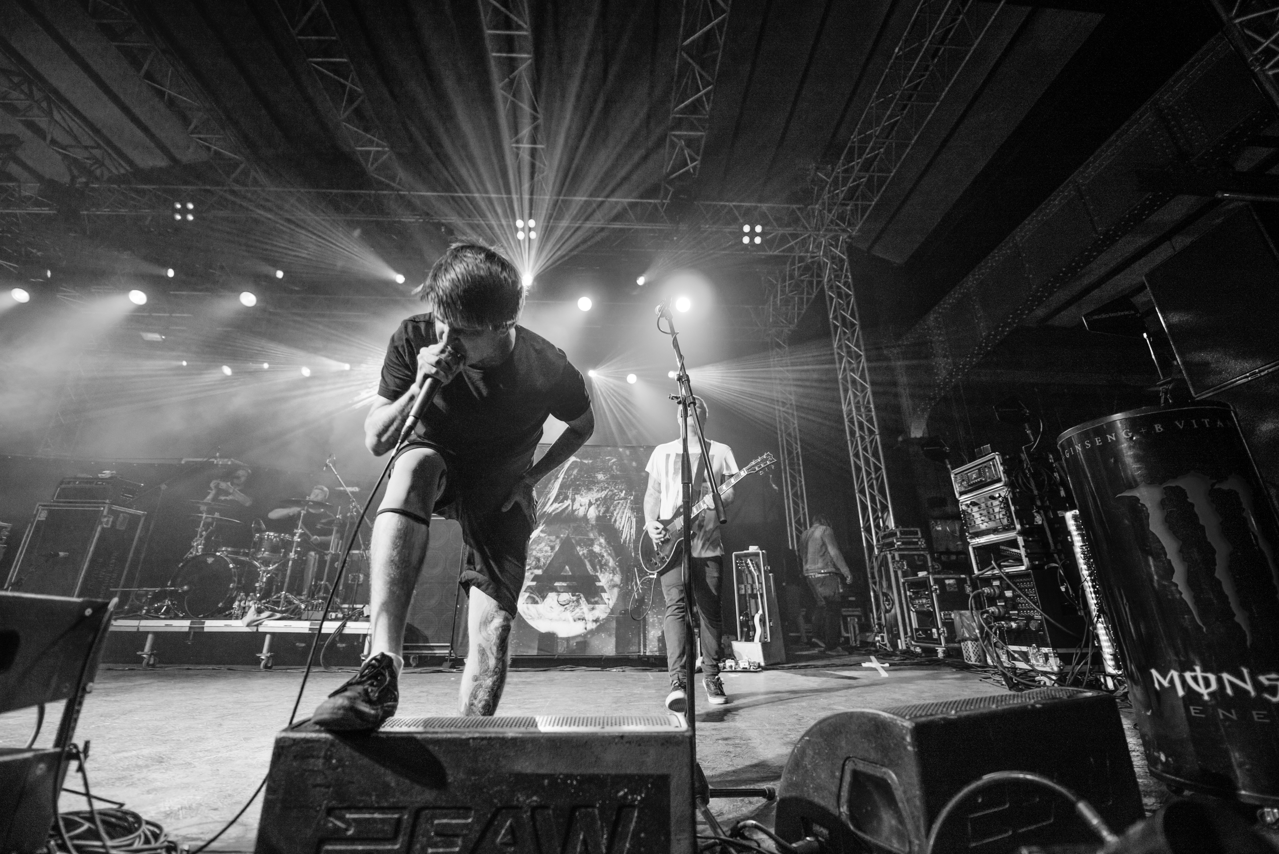 'Impericon Festival 2015; Oberhausen Turbinenhalle': 'Adept'